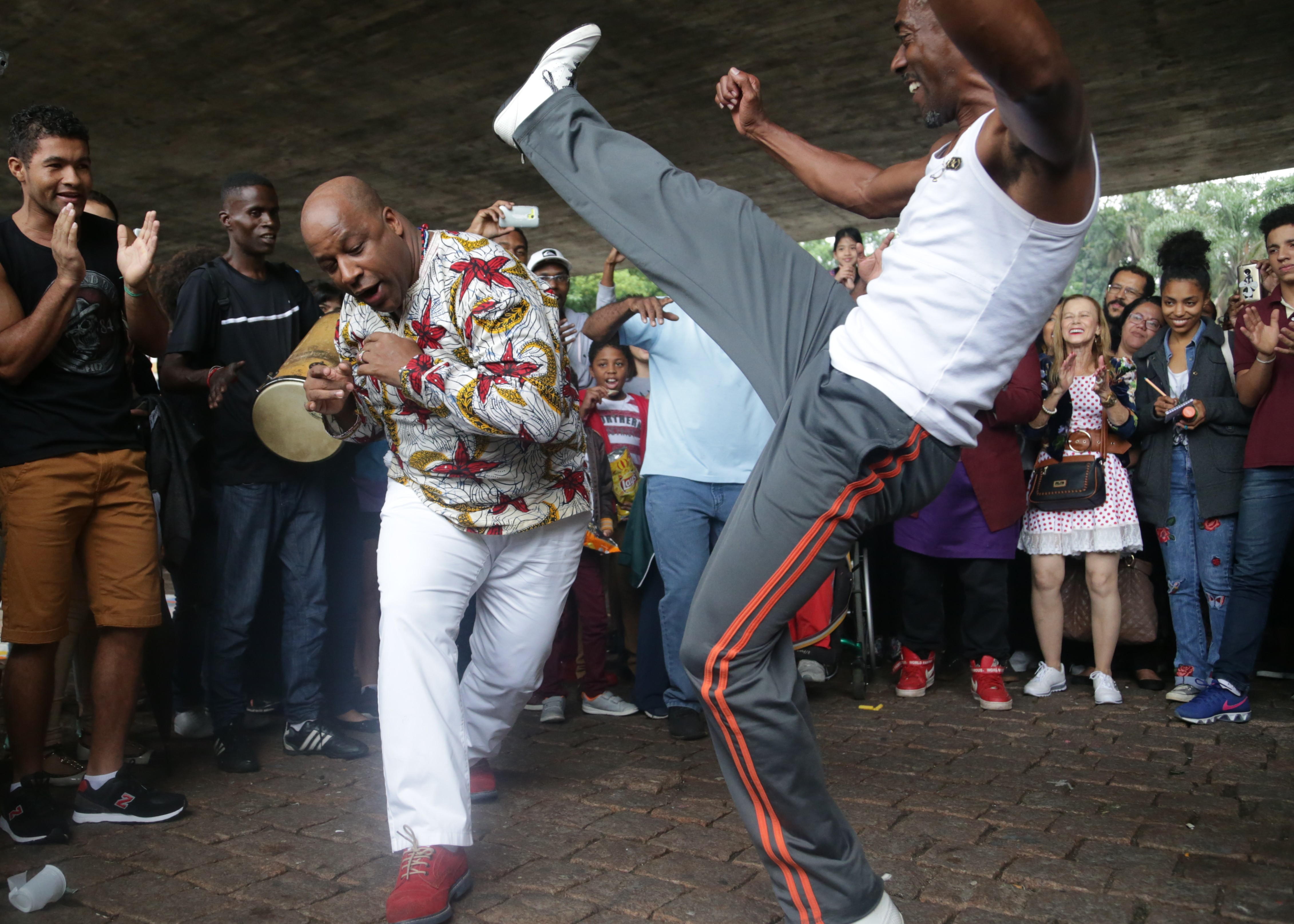 20/11/2017- São Paulo- 14ª Marcha da Consciência Negra de São Paulo. Contra racismo e o genocídio: Por um projeto político de vida para o povo negro. Foto: Paulo Pinto/AGPT